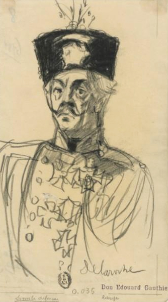 Félix Galipaux (Prince Basil) dans Le Comte de Luxembourg : dessin